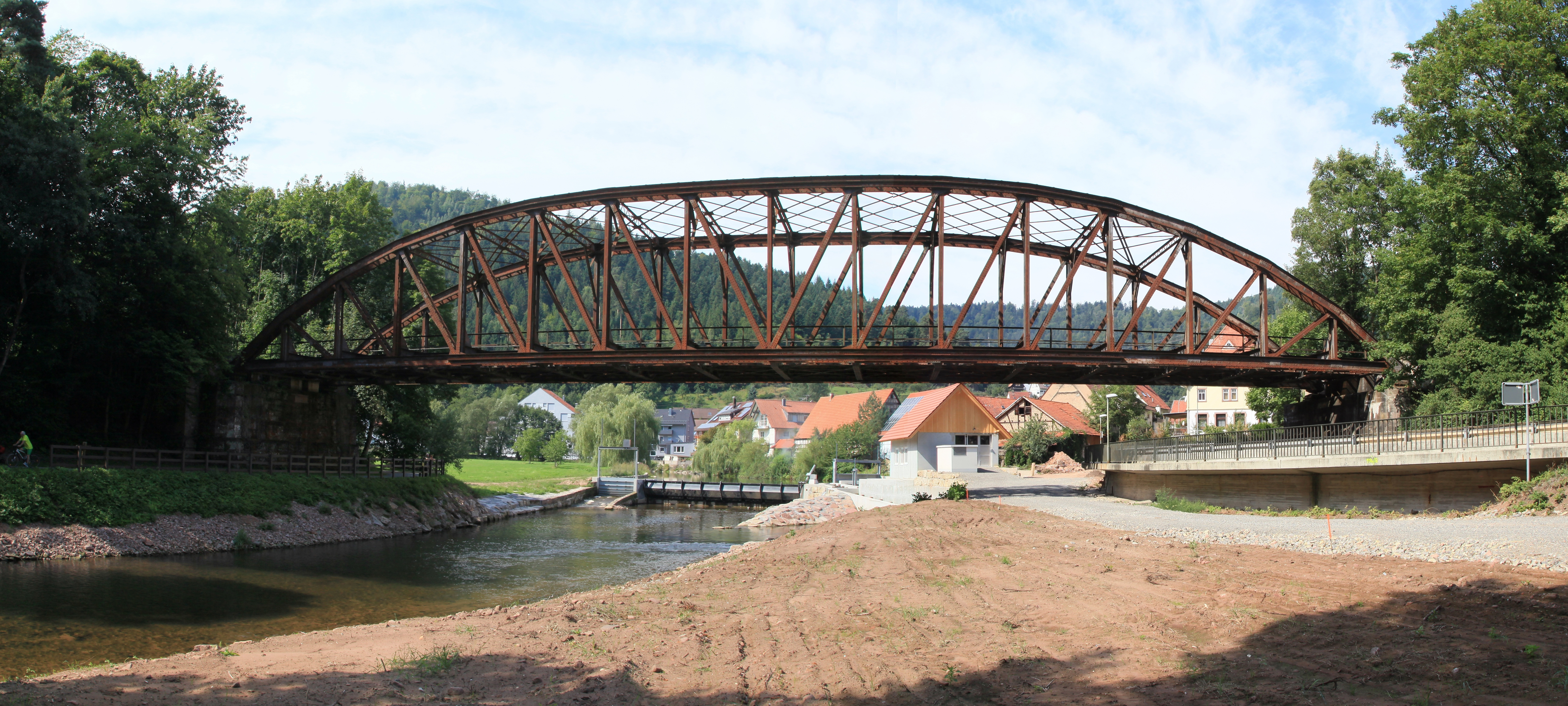 Bahnbrücke über Pforzheimer Straße und Nagold vor dem Wasserkraftwerk in Unterreichenbach